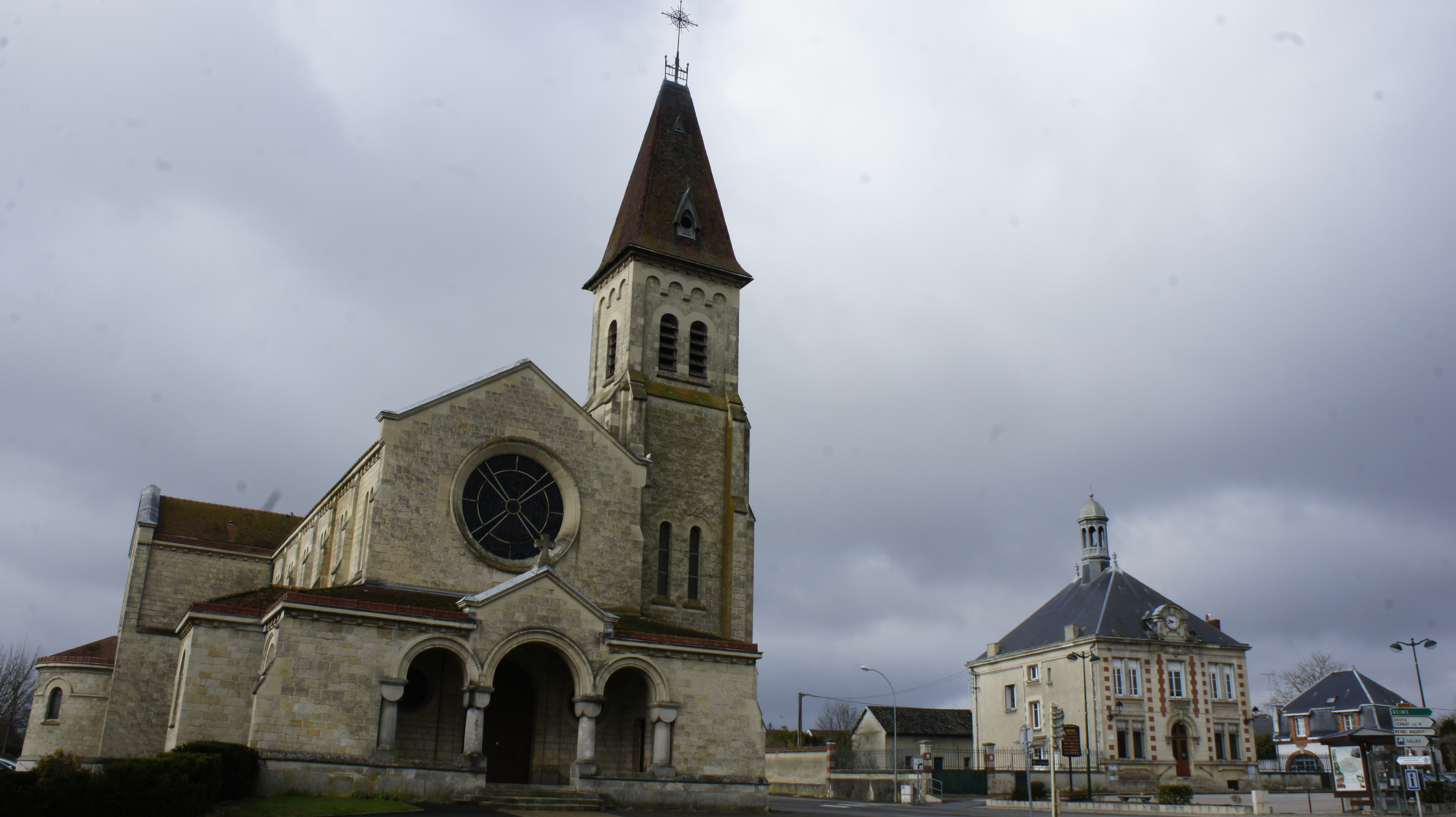 Place principale où se trouve l'égliseet la Maison communale .